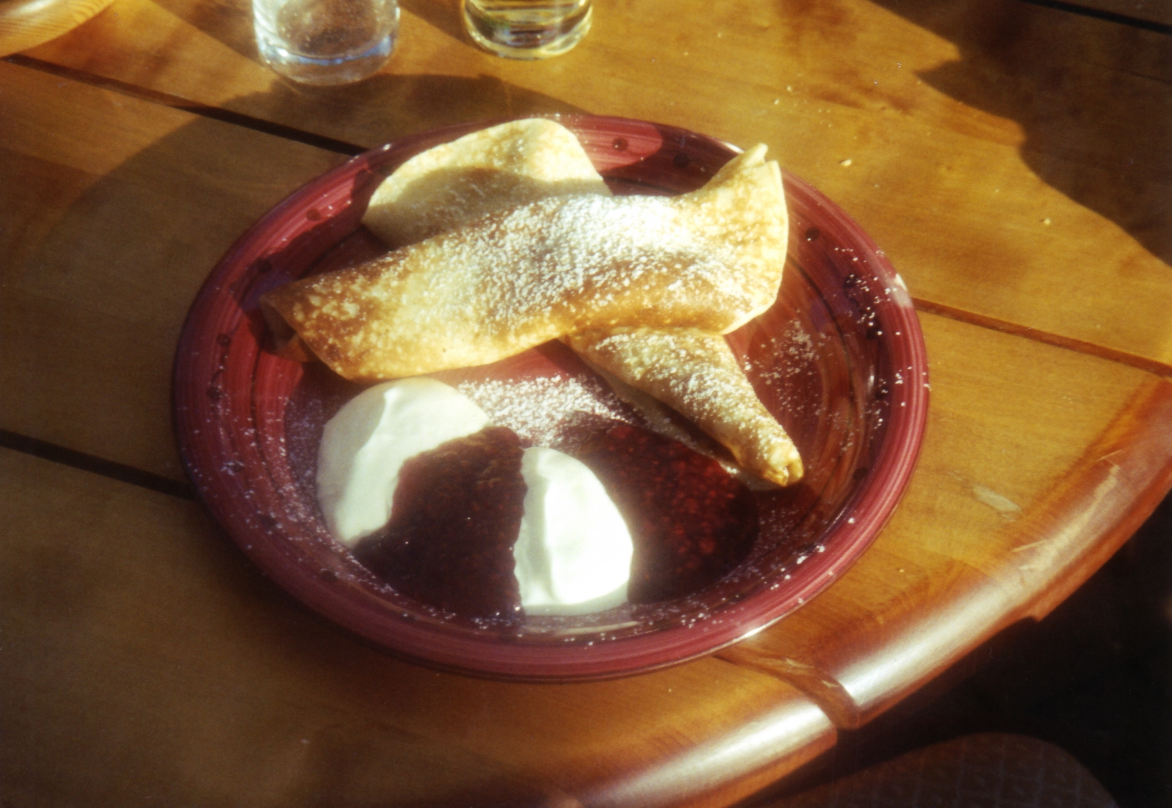 Orienteŭropaj blinoj, parto de la rusa, litova kaj aliaj orienteŭropaj kuirartoj